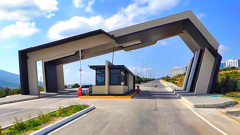 İyte Güzelbahçe kampüsü giriş kapısı